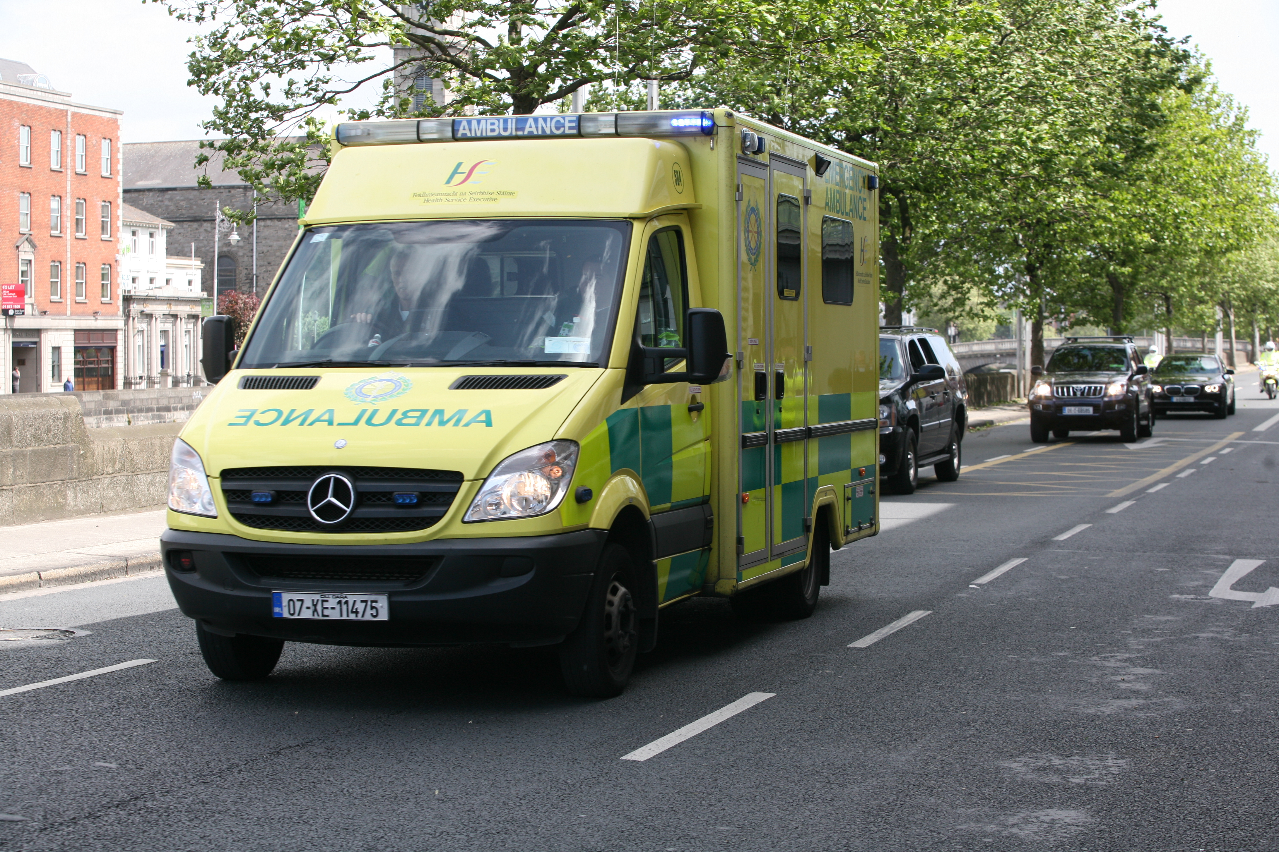 HSE Ambulance Obama Cavalcade 07KE11475